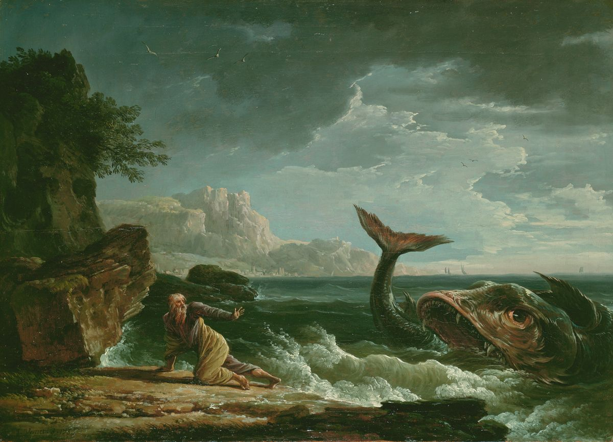 Peinture